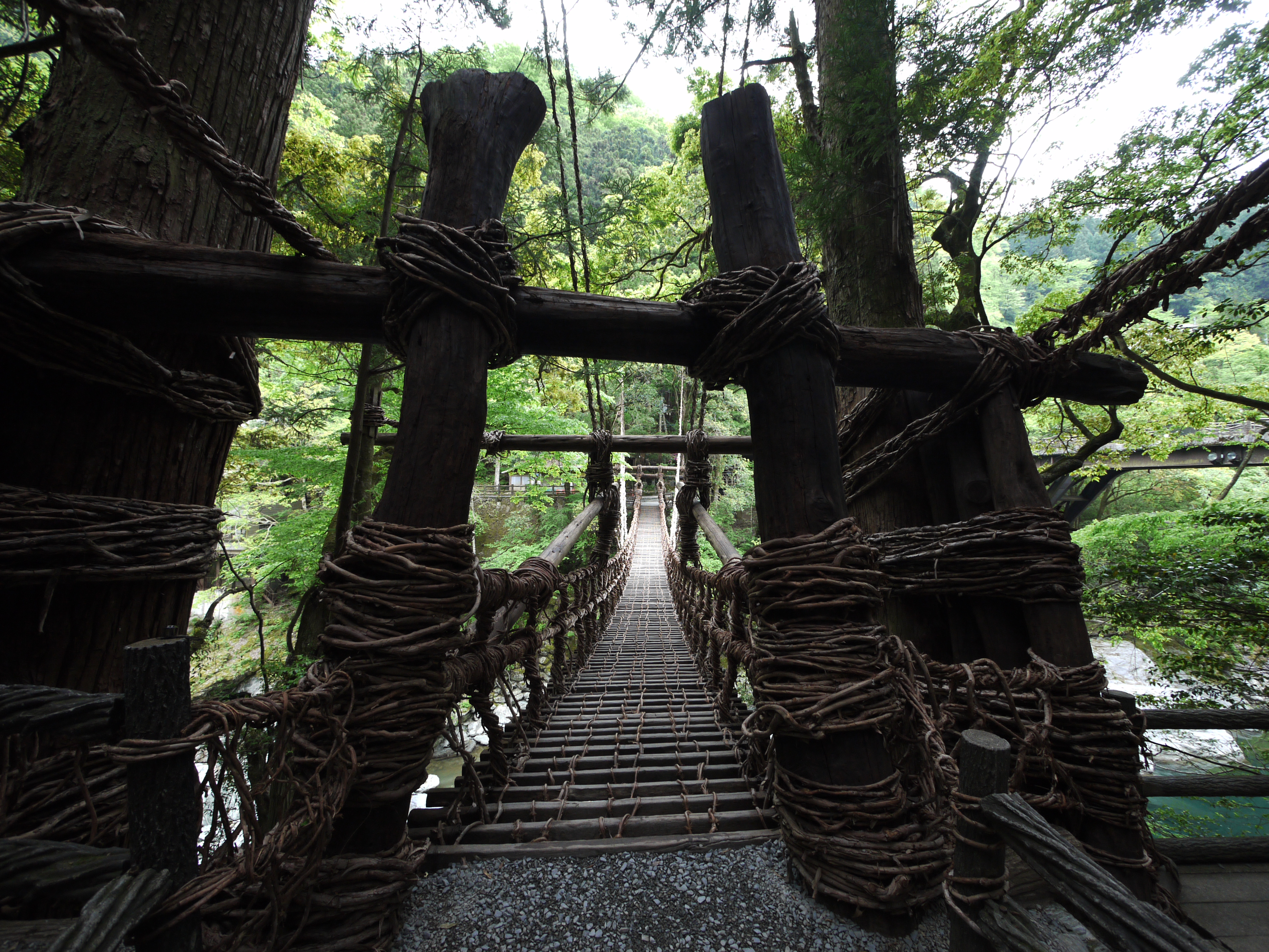 祖谷のかずら橋 入り口から橋全体をのぞむ